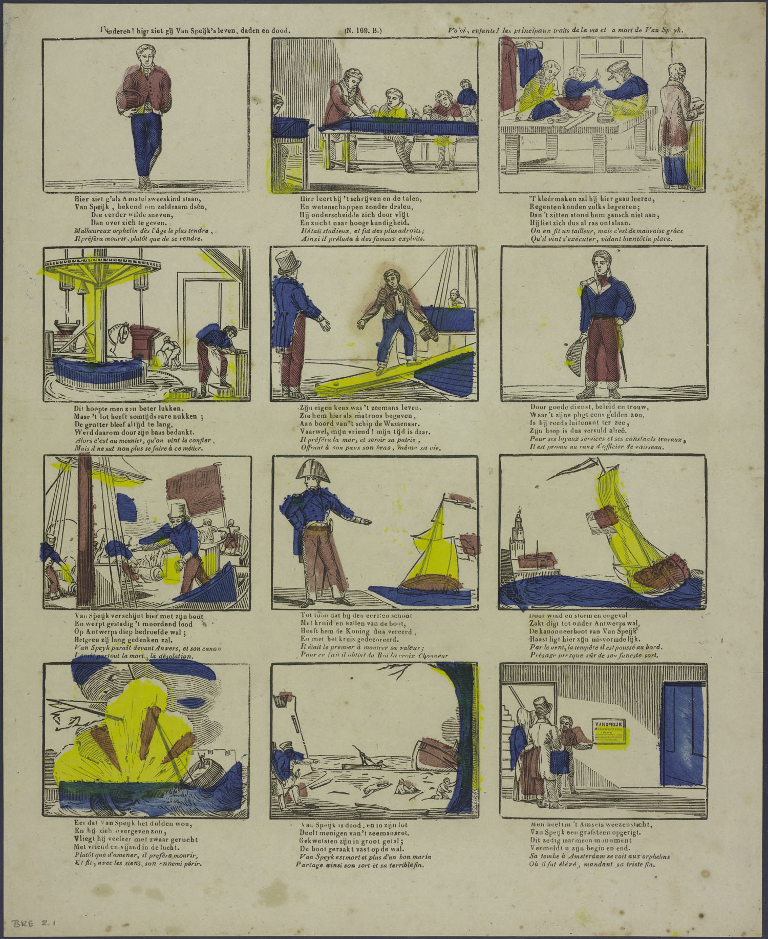 Centsprent met 4 x 3 omkaderde houtsneden, met afbeeldingen uit het leven van Jan van Speijk (1802-1831), op school, als kleermaker en grutter en als zeeman. Hij wordt officier, krijgt een medaille, komt aan lager wal (bij Antwerpen) en laat zijn schip ontploffen. Er zijn veel doden en gewonden. In het weeshuis is een 'grafsteen' opgericht. Bevat vierregelige rijmende onderschriften in Nederlands en tweeregelige in Frans.